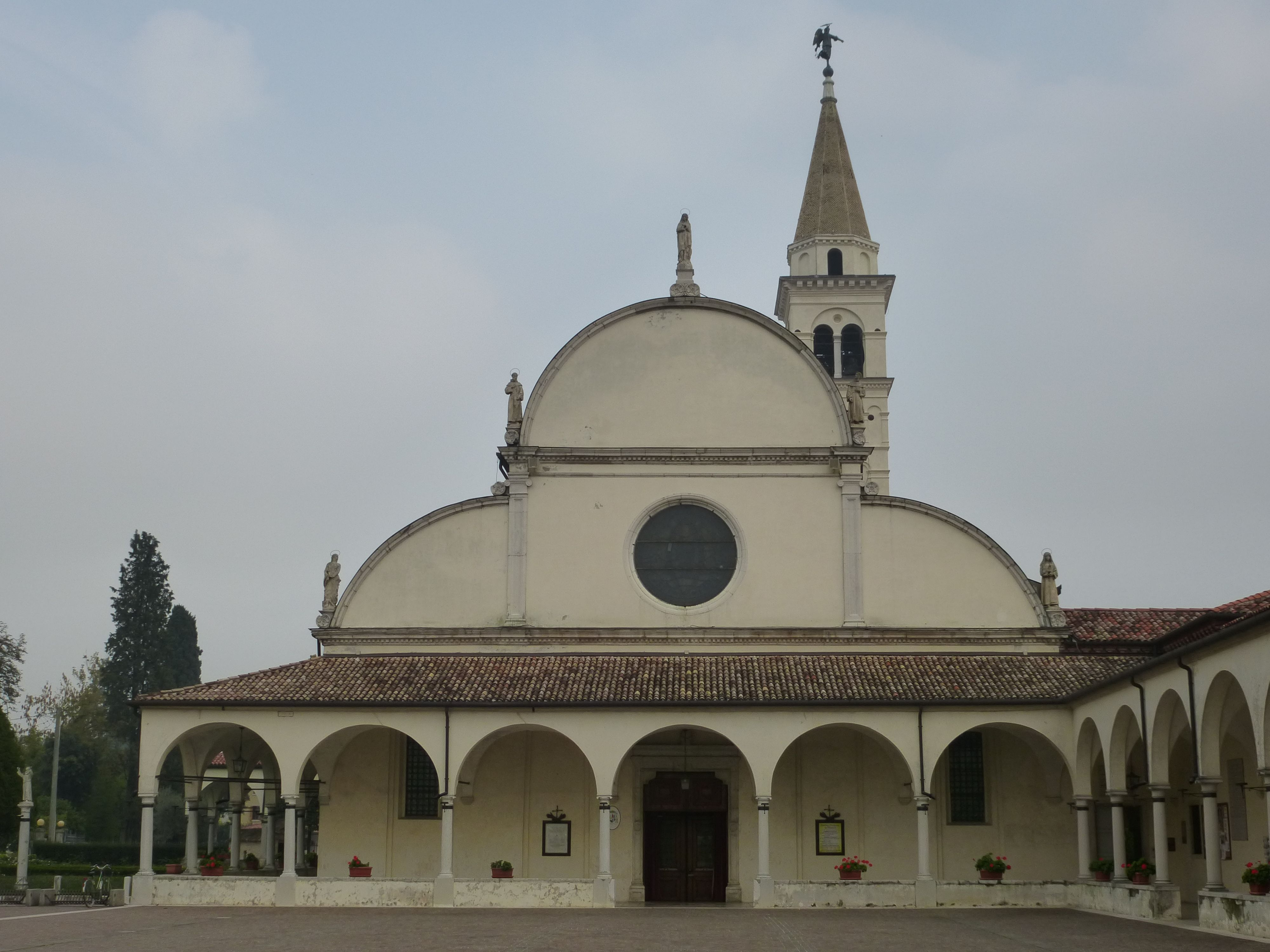 Wallfahrtskirche Basilica Madonna dei Miracoli in Motta di Livenza